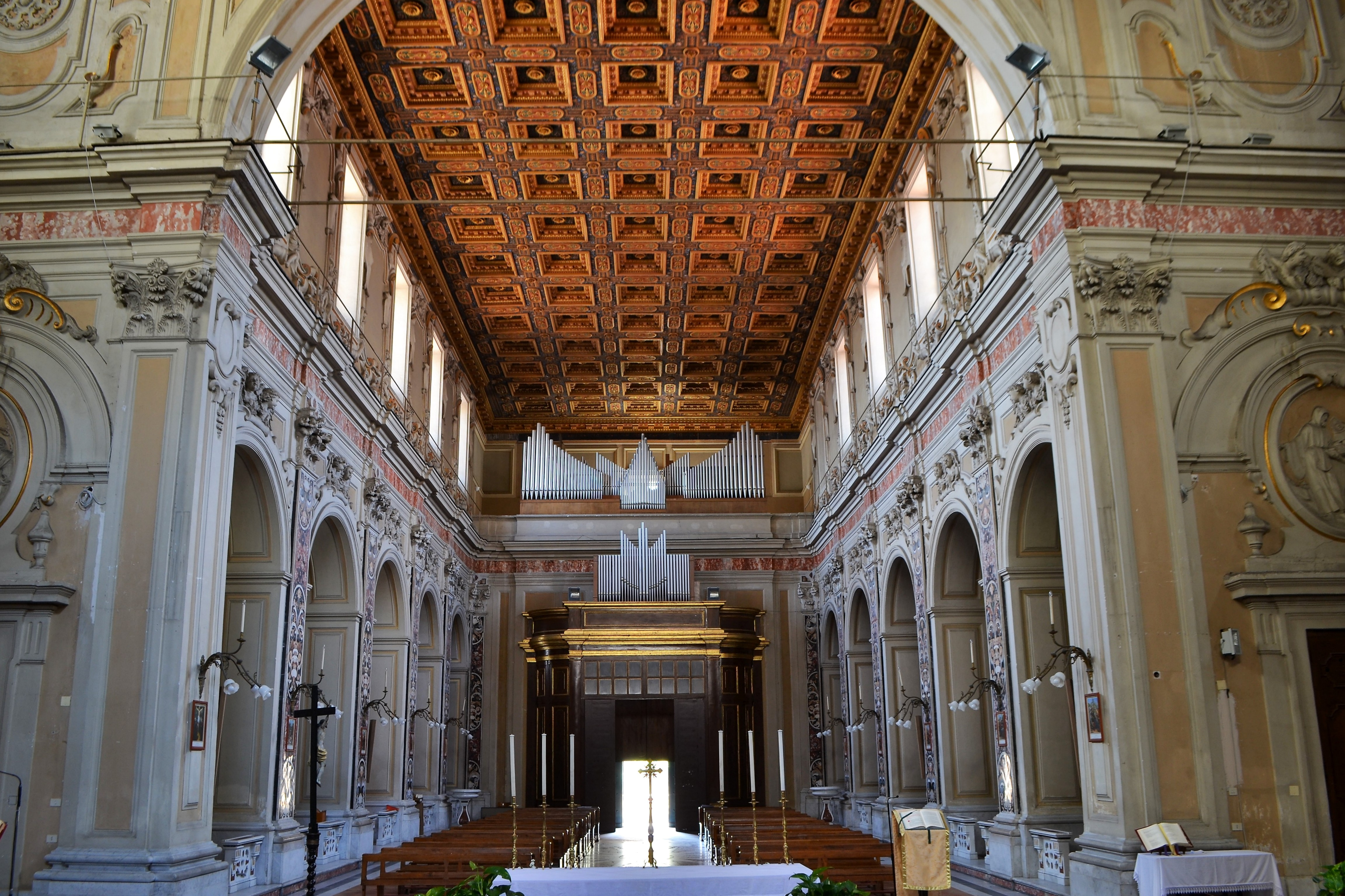 Chiesa di Santa Maria della Stella, Napoli